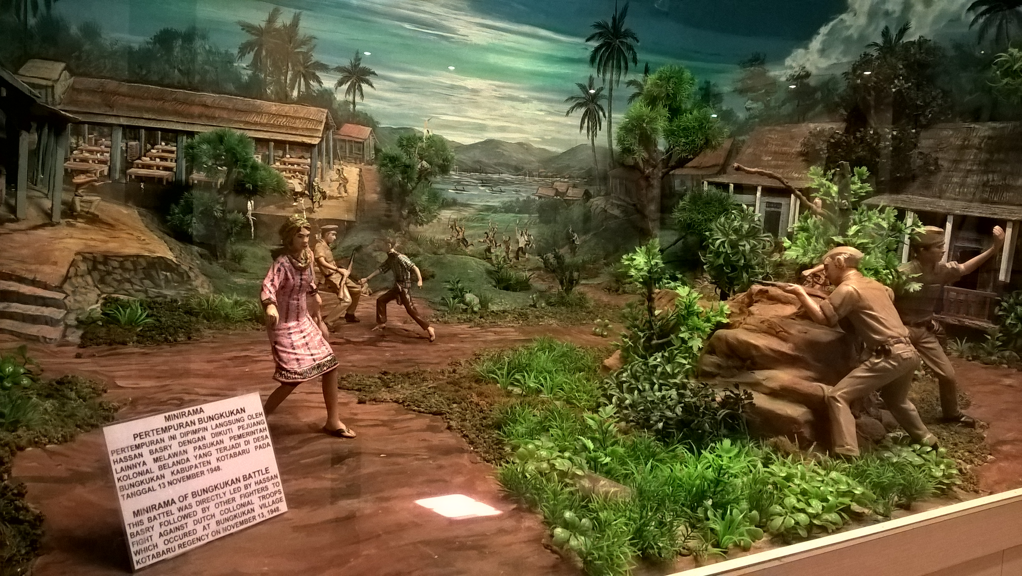 Tertulis keterangan: "Pertempuran ini dipimpin langsung oleh Hassan Basry dengan diikuti pejuang lainnya melawan pasukan pemerintah kolonial Belanda yang terjadi di Desa Bungkukan, Kab. Kotabaru, Kalimantan Selatan pada 13 November 1948". Gambar ini diambil di Museum Perjuangan Rakyat Wasaka (Waja Sampai Kaputing), Banjarmasin, Kalimantan Selatan.